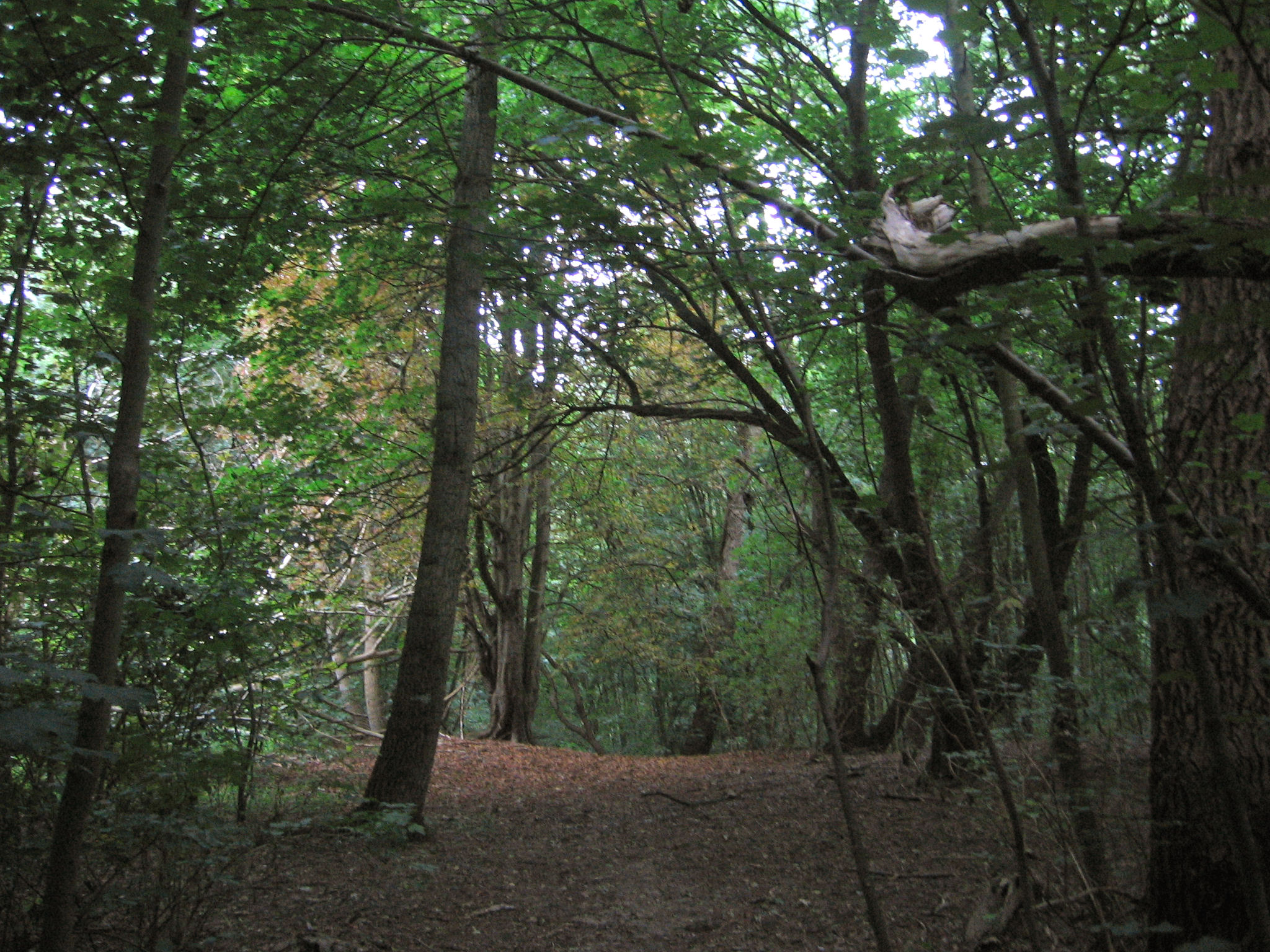 Een typisch tafereel in het Calmeynbos. Foto door Tim Bekaert.